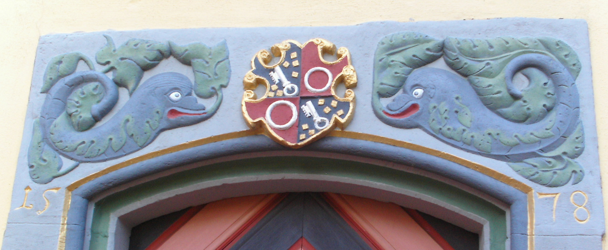 Wappenstein des Wormser Bischofs Dietrich von Bettendorff in Ladenburg